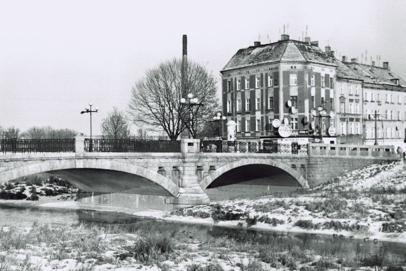 Neobarokowy most na Kaczawie w Legnicy, bud. 1903-1904. Neo-baroque bridge on the river Kaczawa in Legnica, Poland, built 1903-1904. photo by Jarrus, Jan 2006